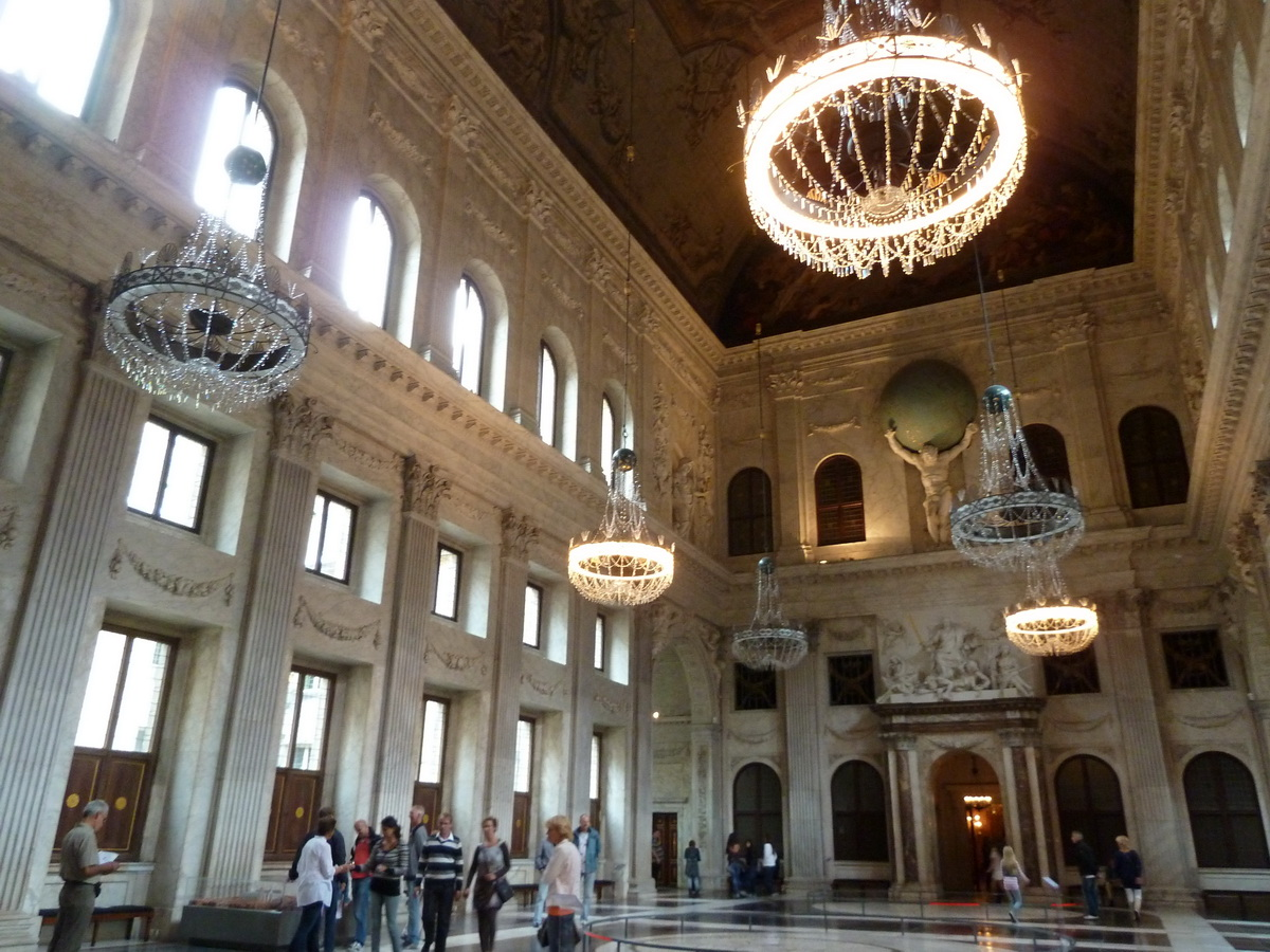 Koninklijk Paleis, Burgerzaal